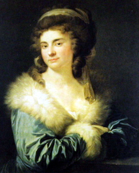 Portrait of Julia Potocka z Lubomirskich (1766-1794)